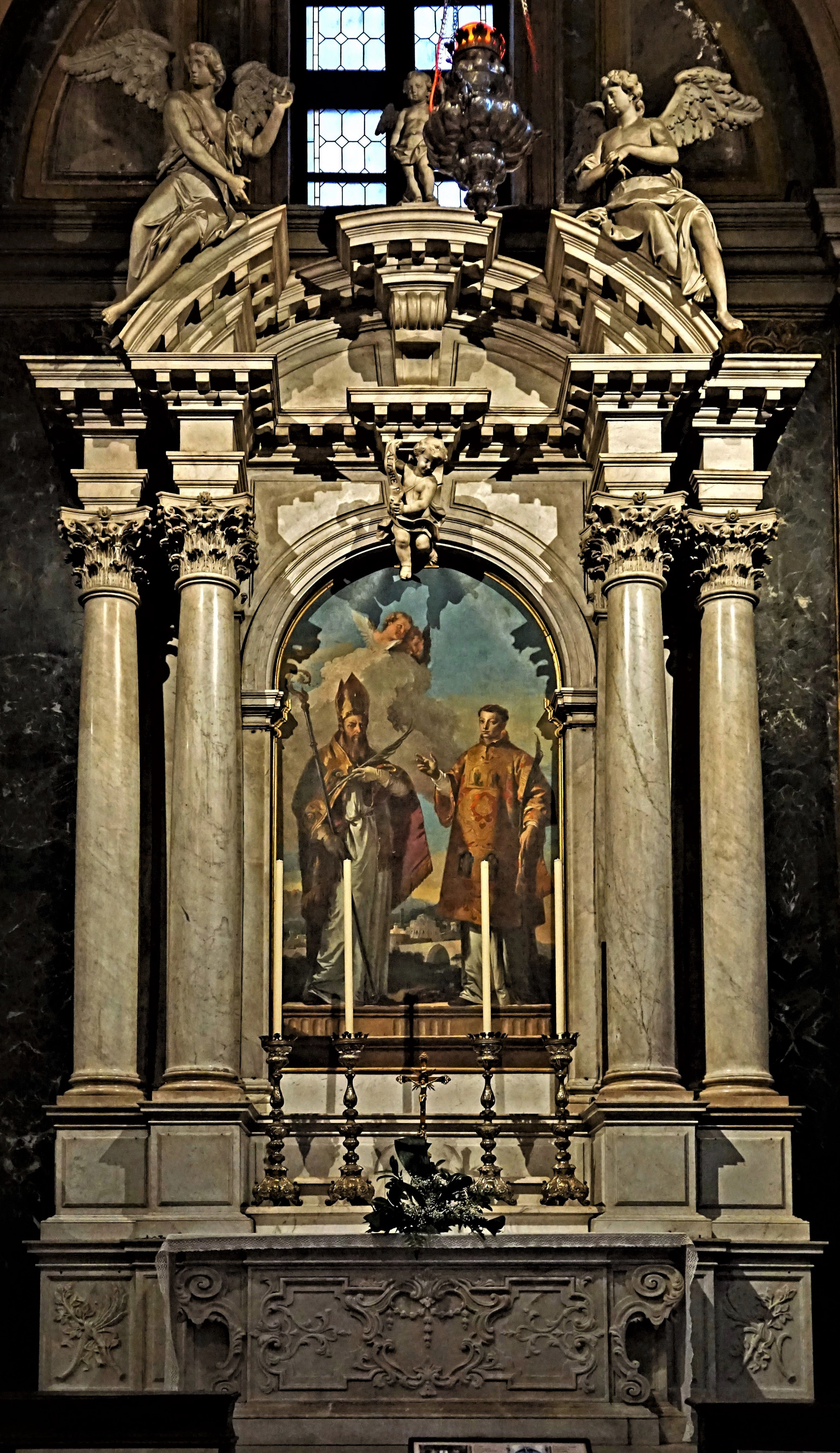 Duomo Santa Maria Annunziata (Udine), Seitenaltar mit Bild von Giovanni Battista Tiepolo